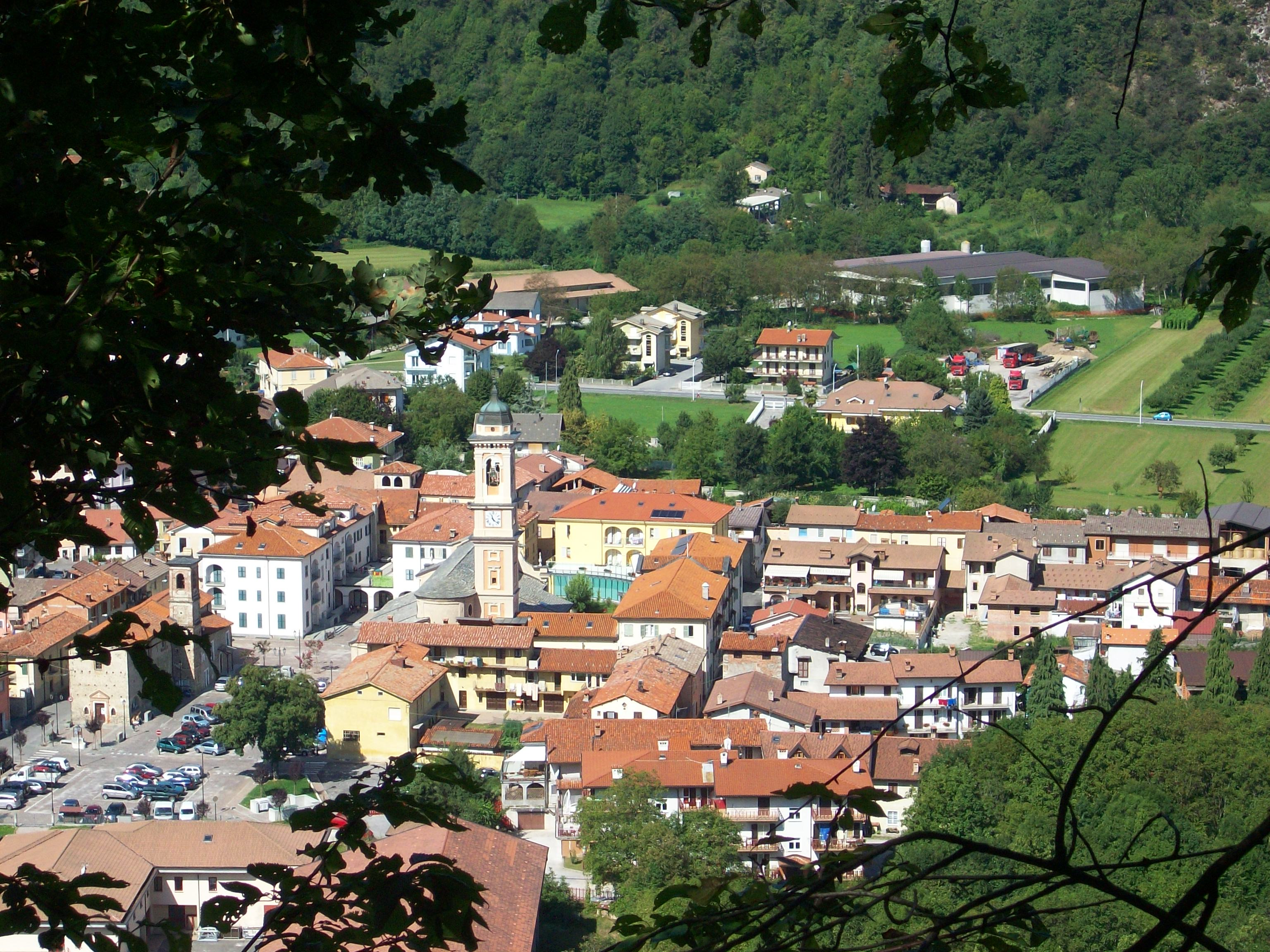 Roccaforte Mondovi visto dal castello